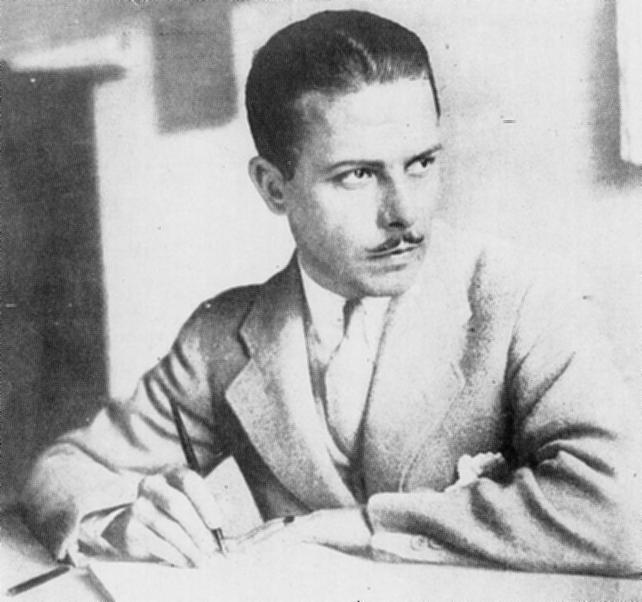 O jornalista e então ator brasileiro, Olympio Guilherme, em 1932.